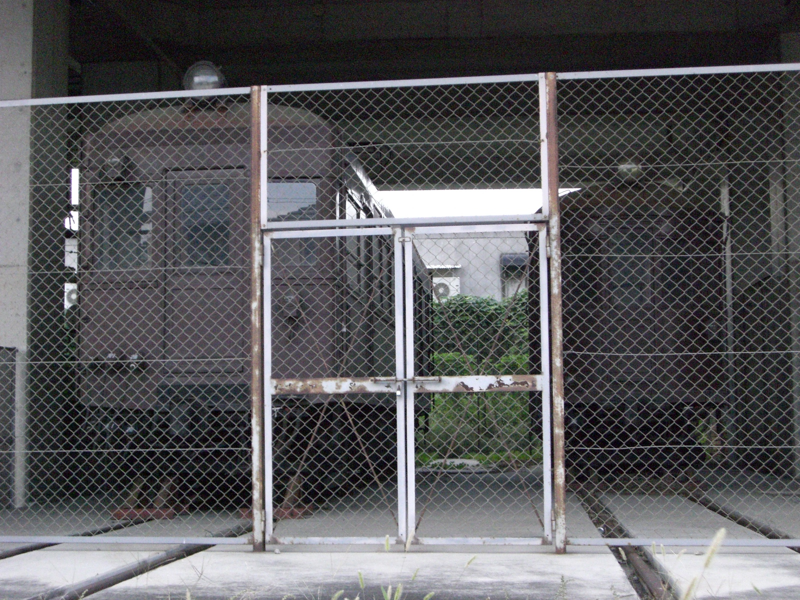 尼崎センタープール前駅近くの高架下に保管されている阪神小型車